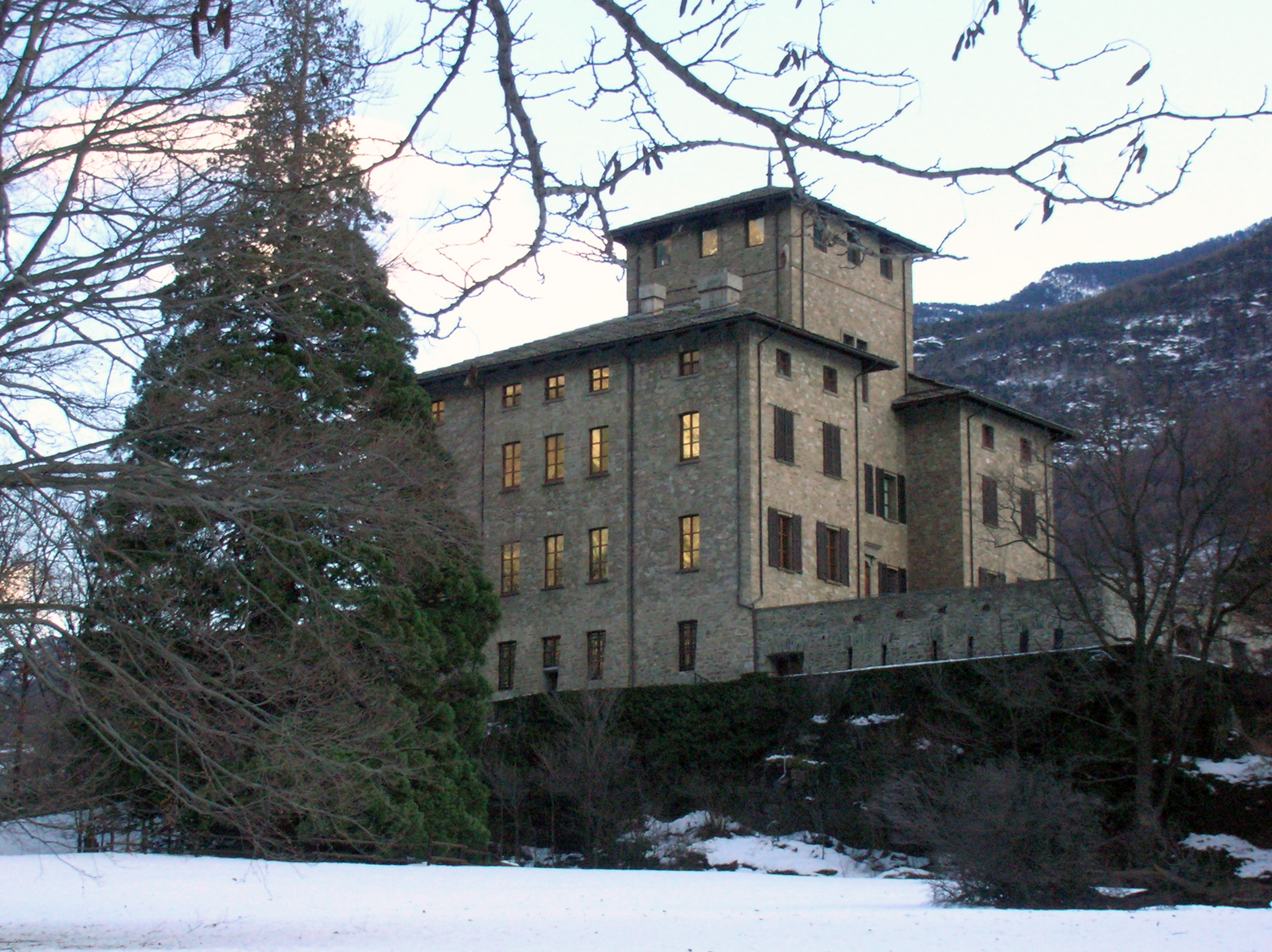 Lato nord-ovest del Castello Baron Gamba, visto dal parco. Si nota sulla sinistra della foto una sequoia monumentale (Sequoiadendron giganteum) di 121 anni, 37 m di altezza e 230 cm di diametro. Châtillon, Valle d'Aosta, Italia.